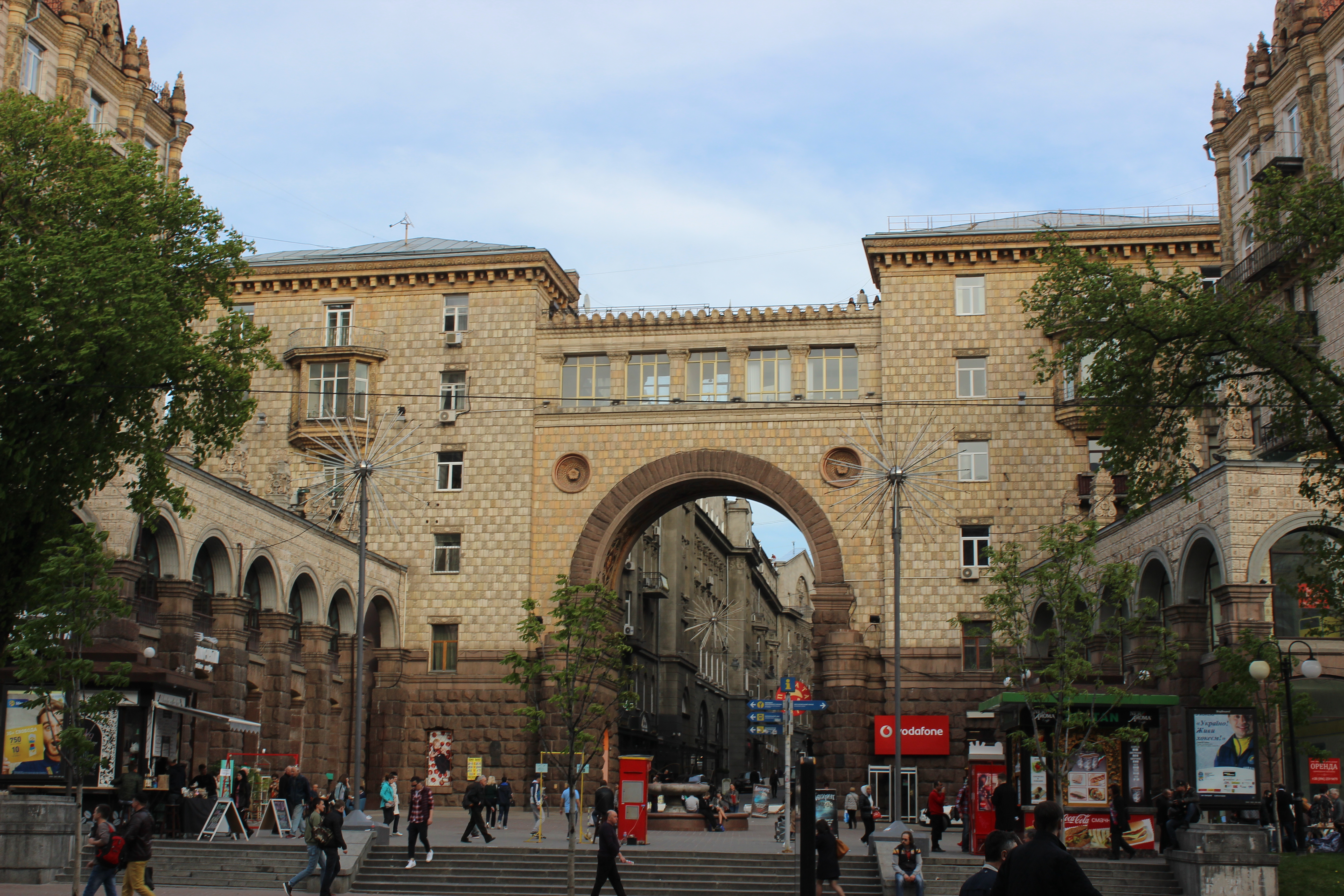 Прибутковий, торгівельний і конторський будинок страхового товариства «Росія» (пасаж), в якому жили І. С. Паторжинський, В. М. Риков, В. П. Некрасов, Б. Р. Гмиря, М. С. Гришко, А. Л. Міхньов, І. І. Нехода, С. Юткевич — митці, Київ, Хрещатик вул., 15/4